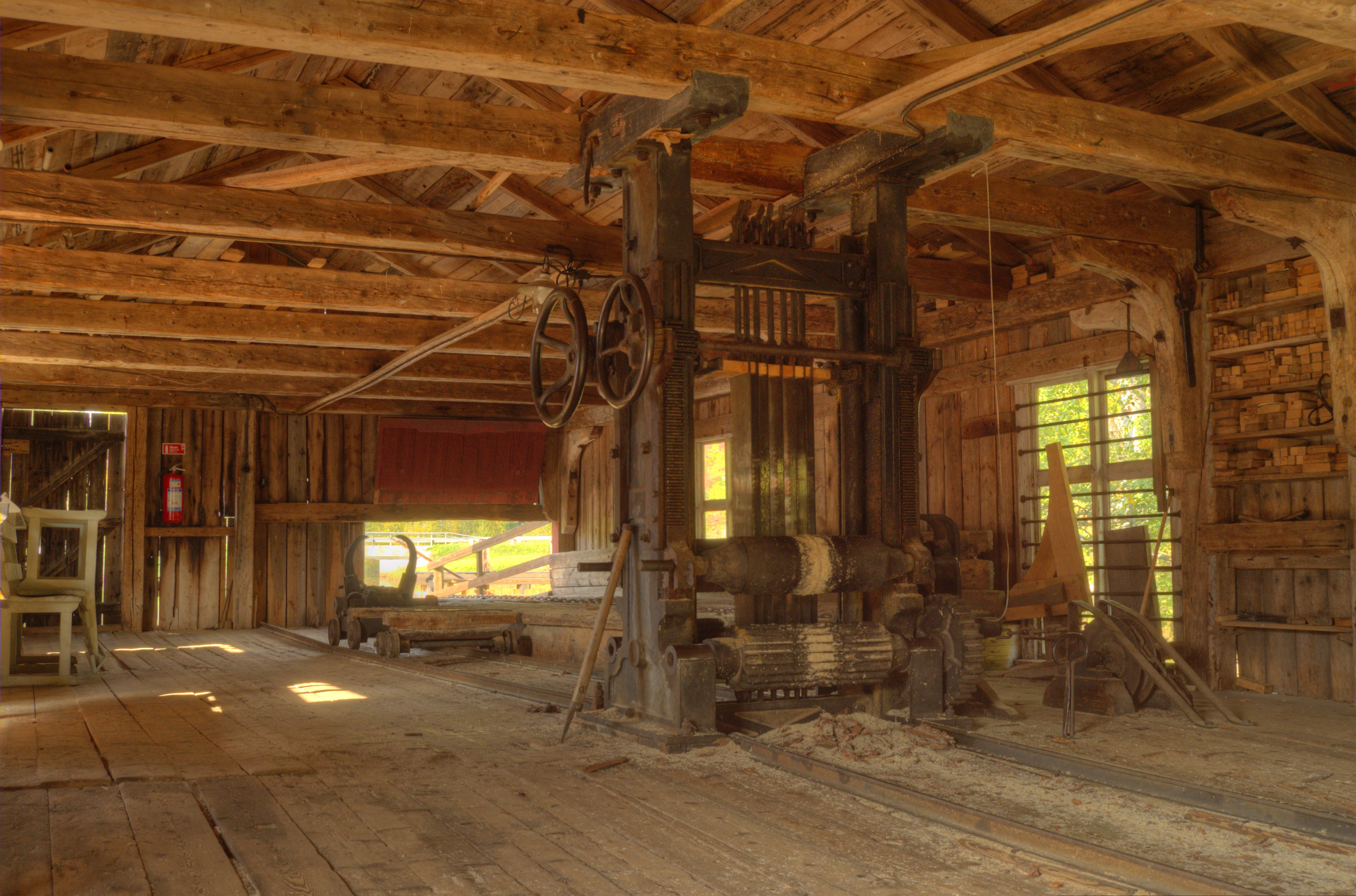 Drängsmarks vatten- och ångsåg (Drängsmark S:4 (Samfälld mark till Drängsmarks by))